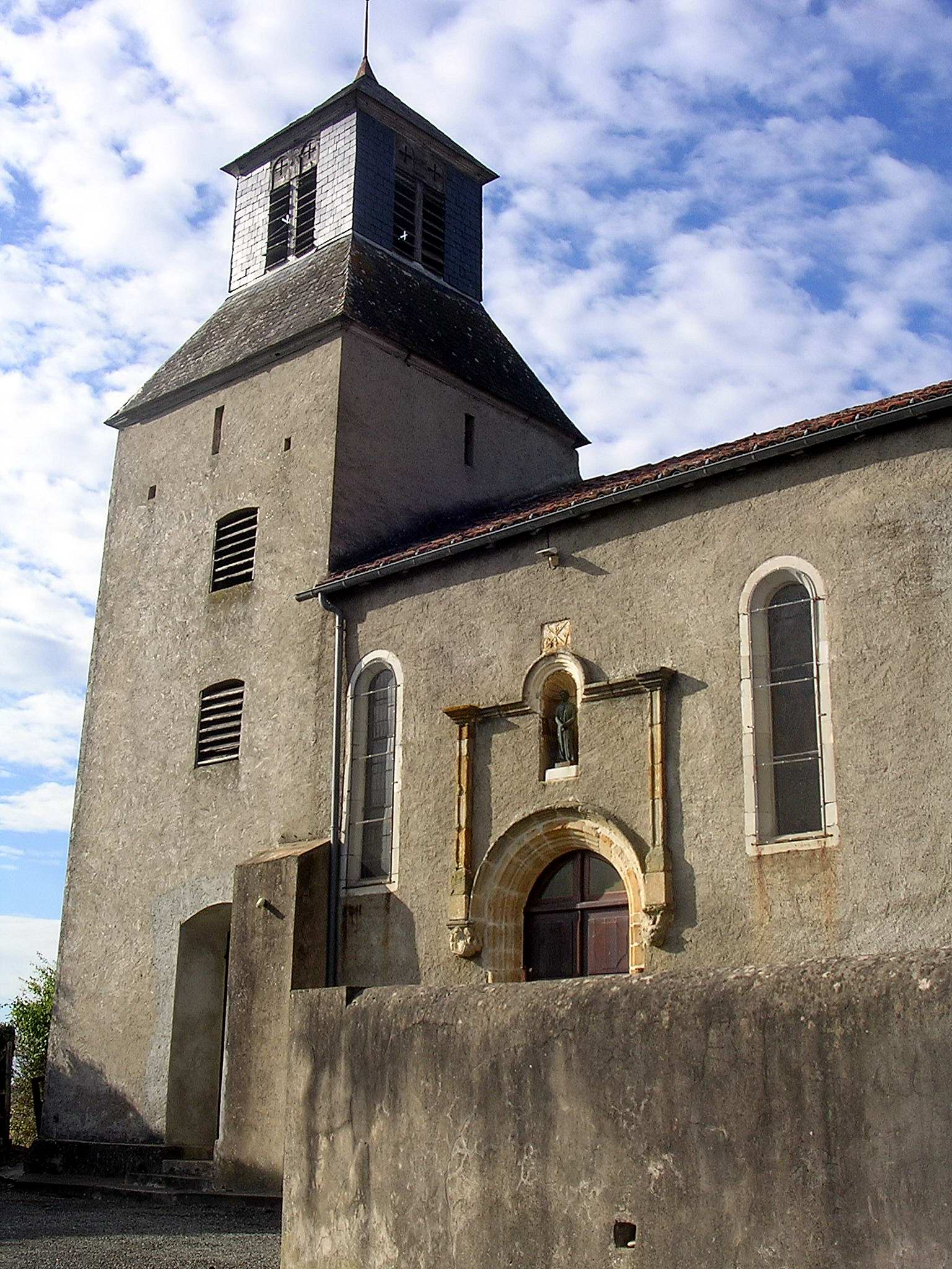 Église Saint-Pierre d'Athos-Aspis, dans le département français des Pyrénées-Atlantiques